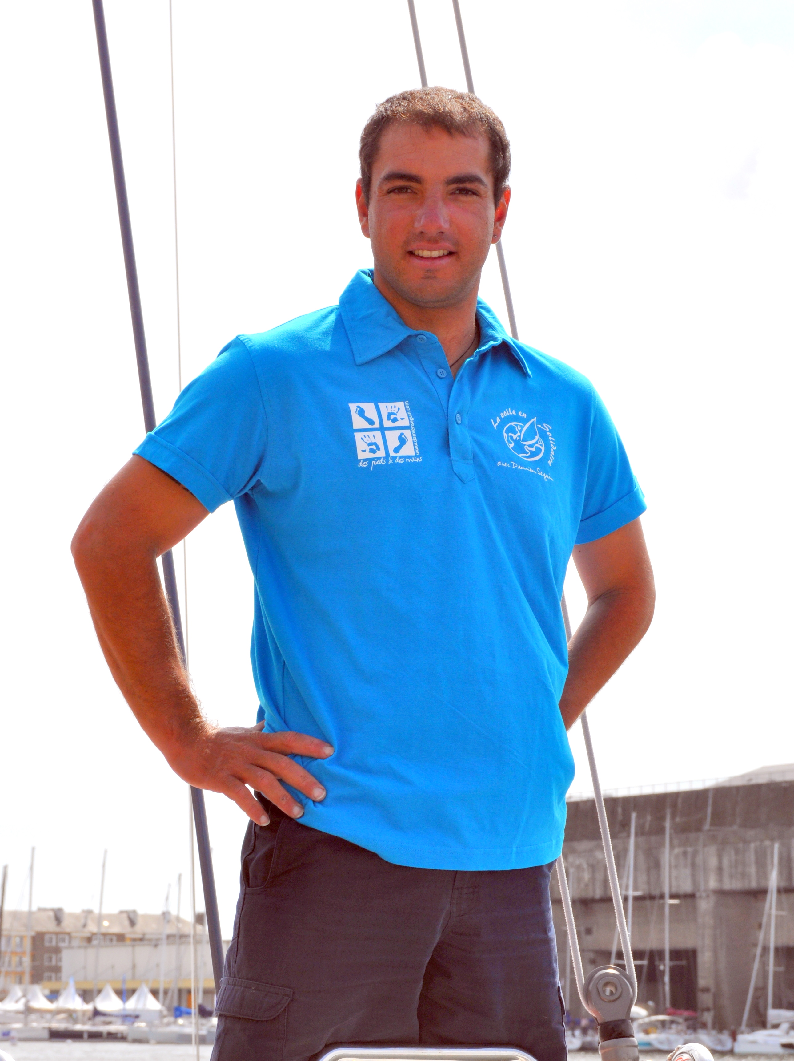 Damien Seguin est un skipper français, menant deux carrières de front : à la fois sur le circuit de course au large et à la fois sur le circuit des jeux paralympiques.